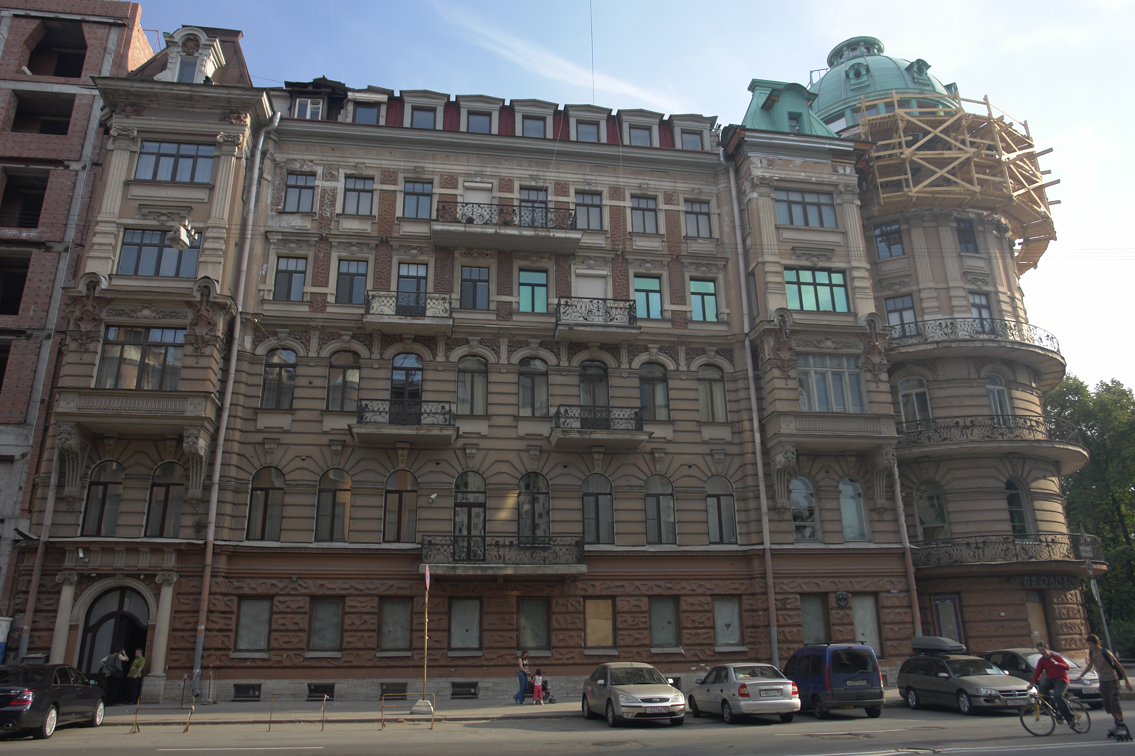 Тверская улица, дом 1. Санкт-Петербург